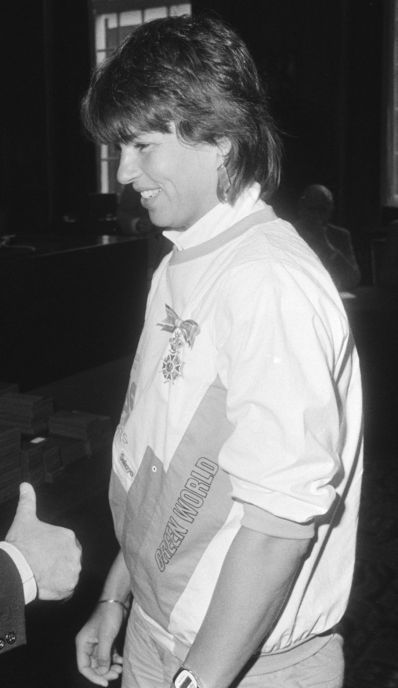 Burgemeester Polak met Lisette Sevens, aanvoerdster van het damenshockeyteam dat wereldkampioen werd